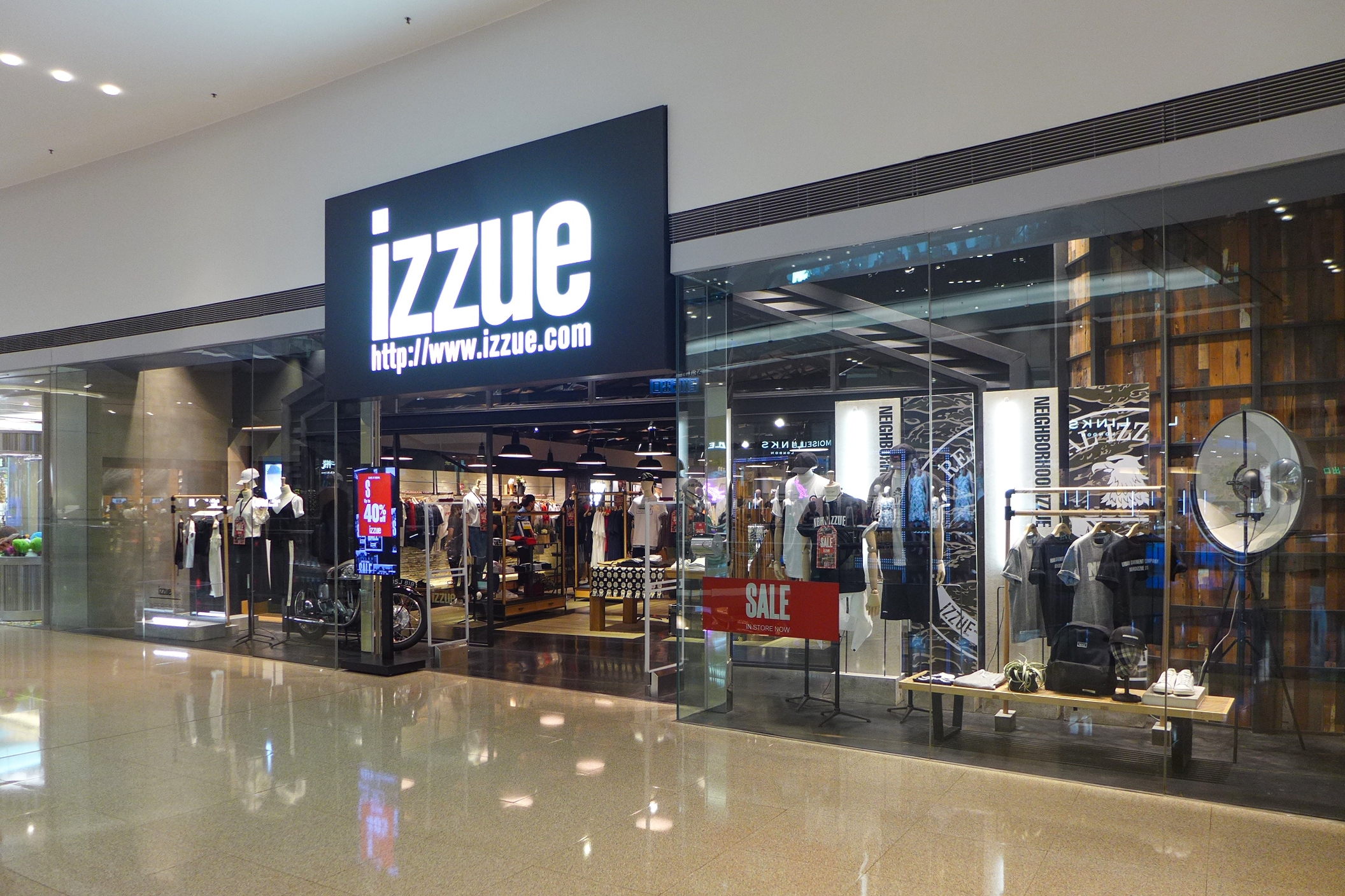 Izzue in Festival Walk